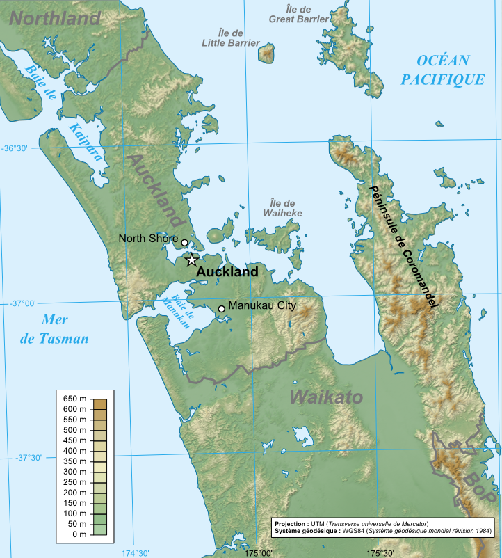 Sujet : Carte physique de la région d'Auckland en Nouvelle-Zélande / Map of Auckland Region in New Zealand. Origine des données d'altitude : site FTP SRTM3 (précision de trois secondes d'arc) du SRTM (Shuttle Radar Topography Mission) de la NASA. Origine des données du littoral et des cours d'eau : site FTP de SWBD (SRTM Water Body Dataset) du SRTM (Shuttle Radar Topography Mission) de la NASA. Visualisation des données d'altitude : Logiciel 3DEM de Visualization Software LLC. Visualisation du littoral et des cours d'eau : Logiciel dlgv32 Pro (version allégée de Global Mapper 9) de l'USGS. Projection : UTM. Système géodésique : WGS84. Logiciels de dessin utilisés : Fond de la carte : . Légendes, lignes et symboles : Inkspace. Format : PNG à partir d'une carte au format SVG intitulée Carte Auckland Region.svg (cette carte en SVG présente actuellement un problème que je vais essayer de résoudre). Méthode : Carte réalisée en s'inspirant des didactitiels de Sting.